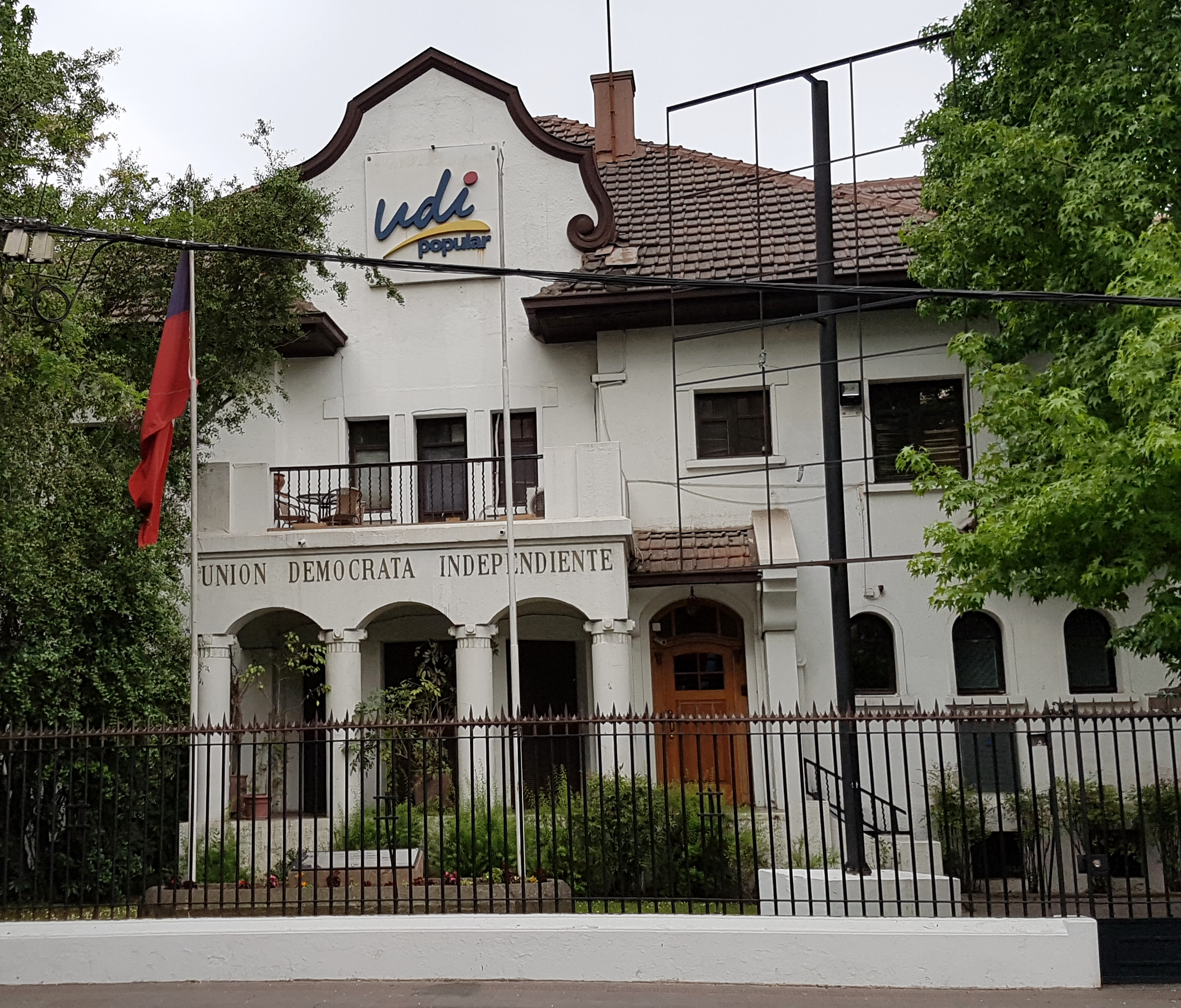 Sede del partido Unión Demócrata Independiente (UDI) en avenida Suecia 286, Providencia, Santiago de Chile.